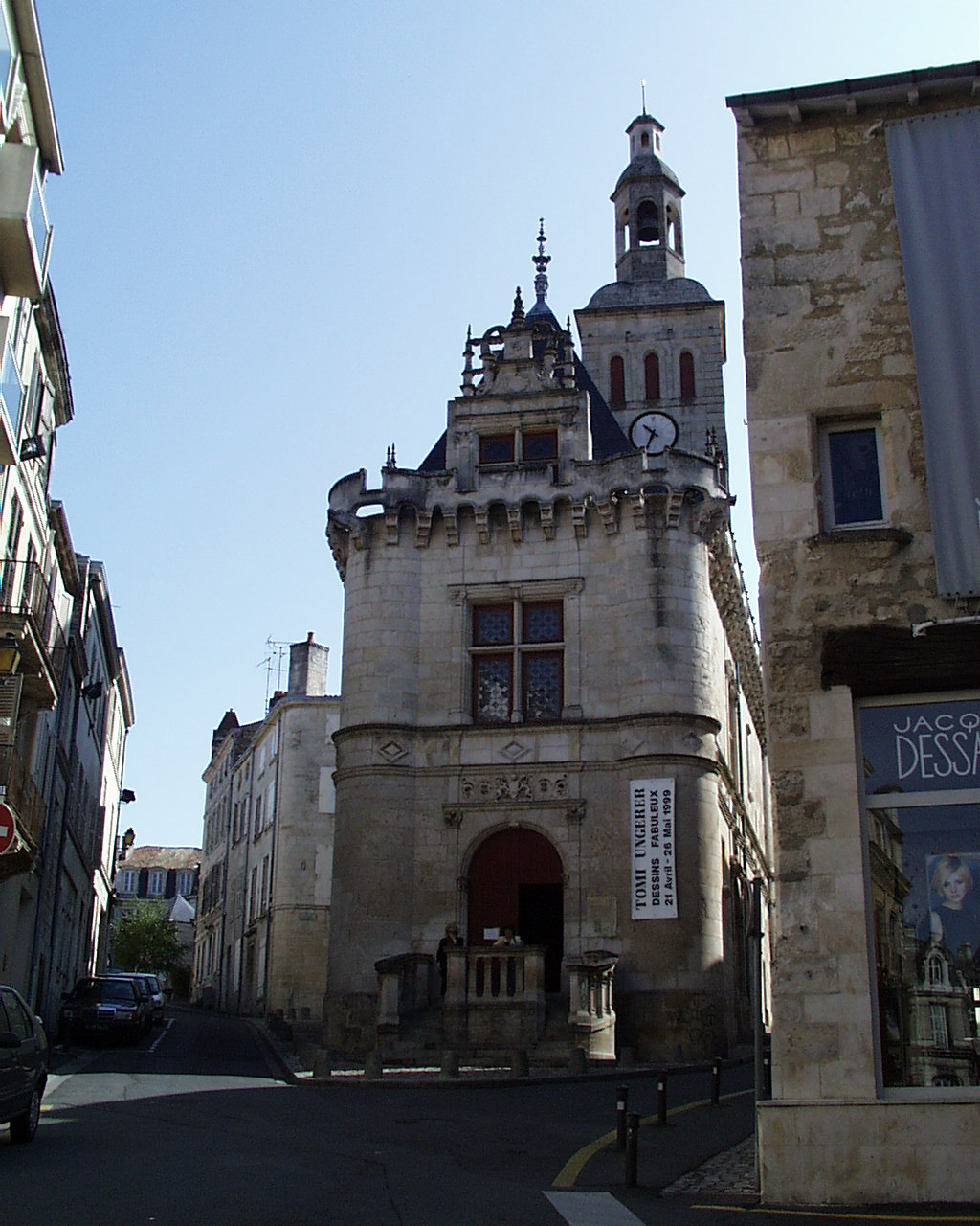 le Pilori (Niort) Ceci est une photo perso prise en 2002 par --Accrochoc 11 déc 2004 à 00:19 (CET)